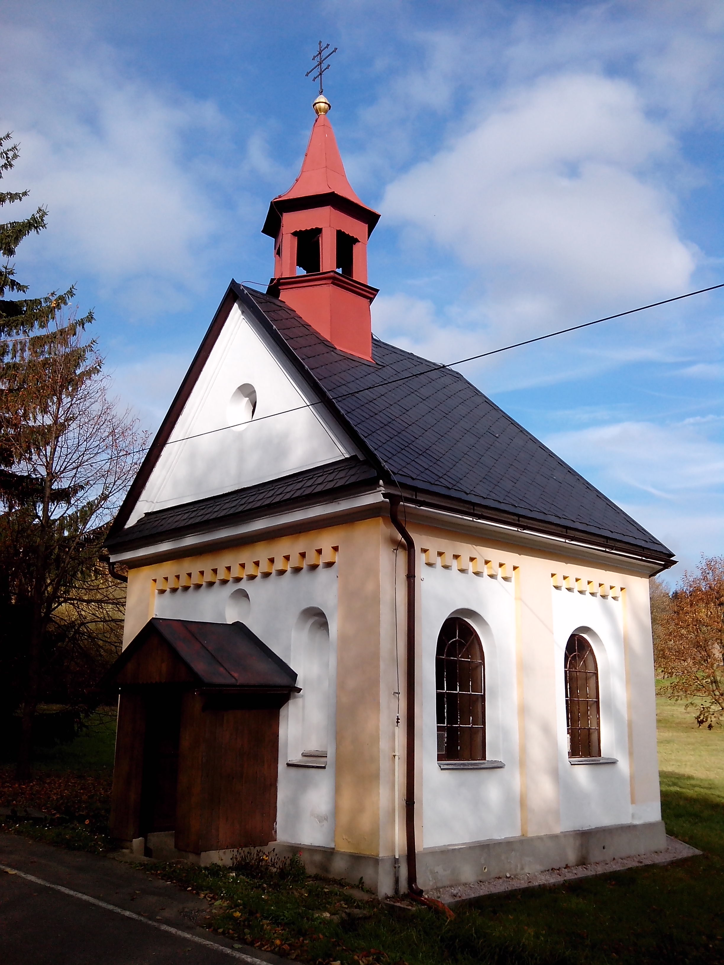 Kaple Panny Marie (Panské Pole)